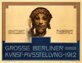 Ausschnitt von Werbepostkarte für die Großer Berliner Kunstausstellung 1912 von Hans Looschen